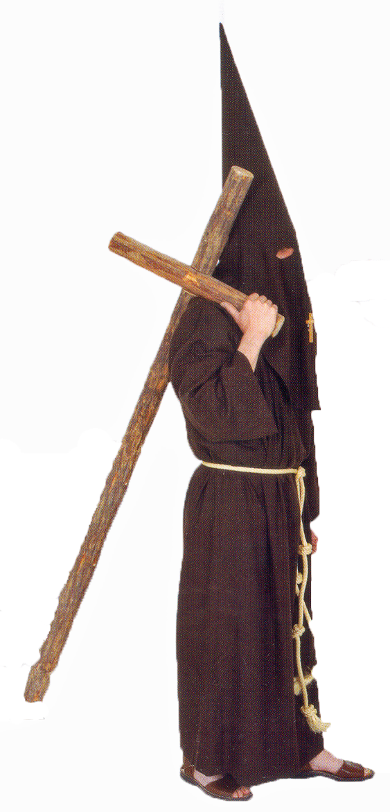 Hábito de la Hermandad de Ntro. P. Jesús de Medinaceli de Ocaña (Toledo)